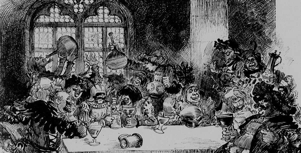 Vignette d'Albert Robida pour le chapitre V de Gargantua. Oeuvres de Rabelais, édition par la Librairie Générale illustrée.